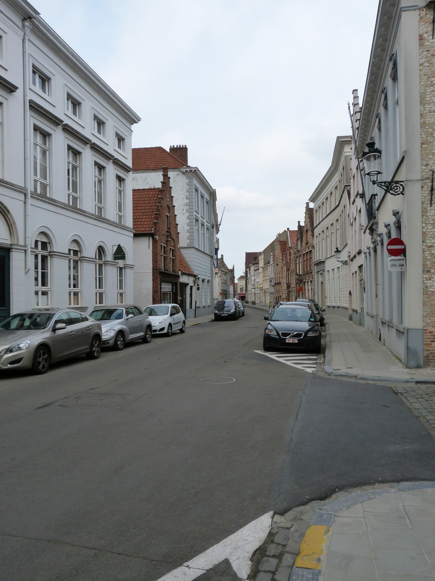 Oude Zak, hoek met Leeuwstraat, richting Ezelstraat, Brugge